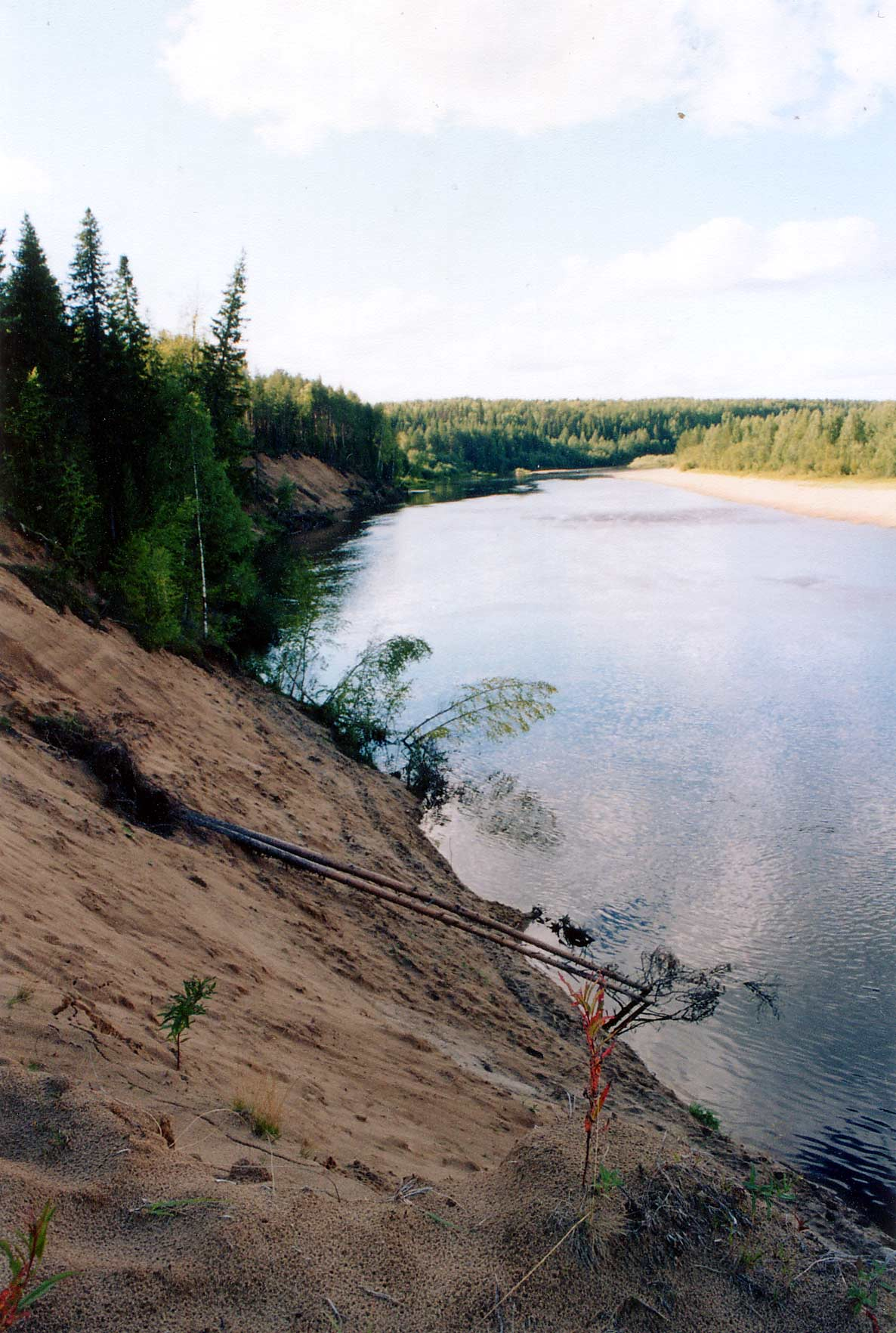 Jarenga-jokea Bogoslovon kylän lähellä.